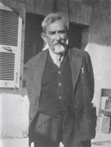 ד"ר הלל יפה